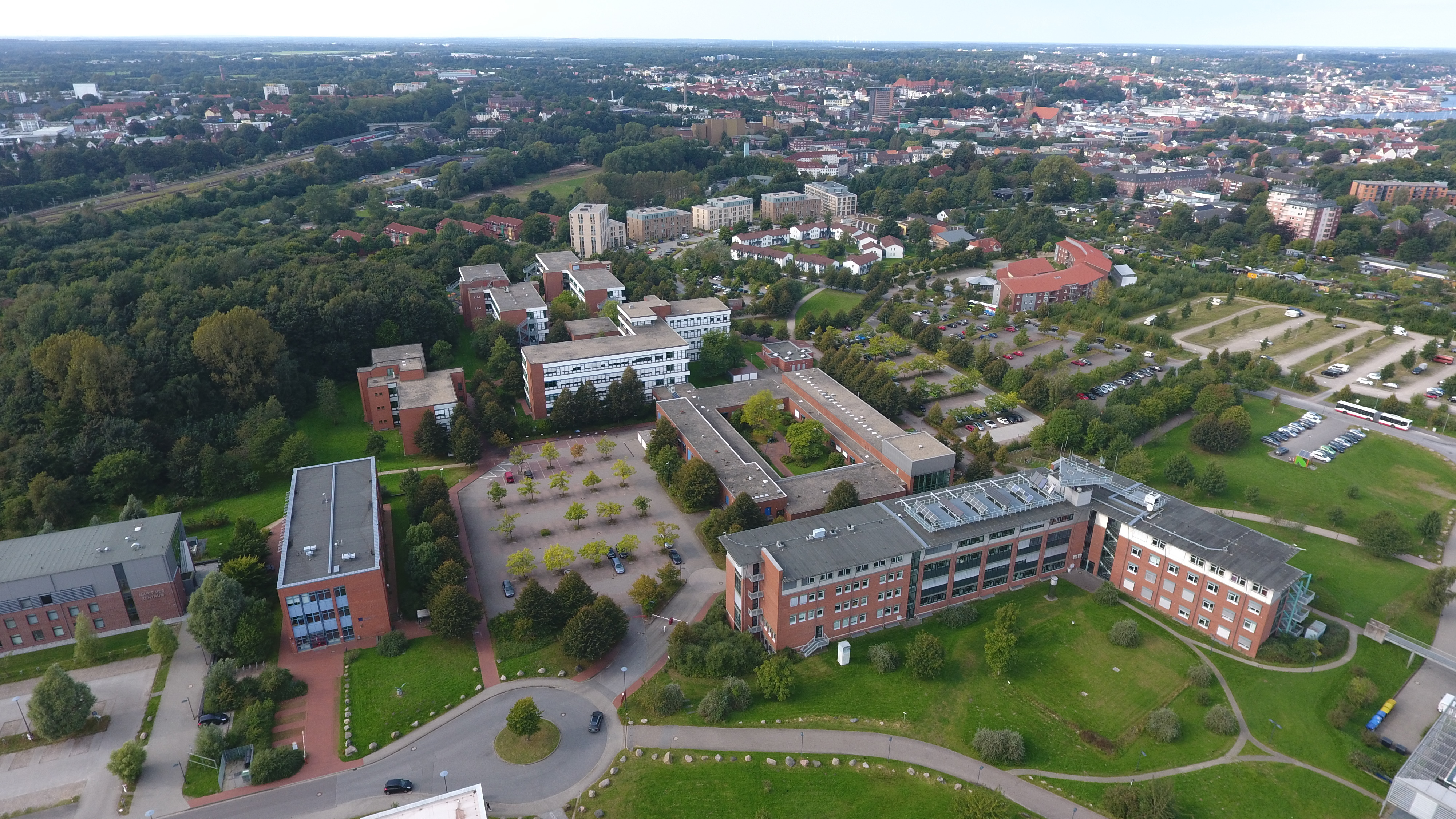 Blick auf die Hochschule Flensburg